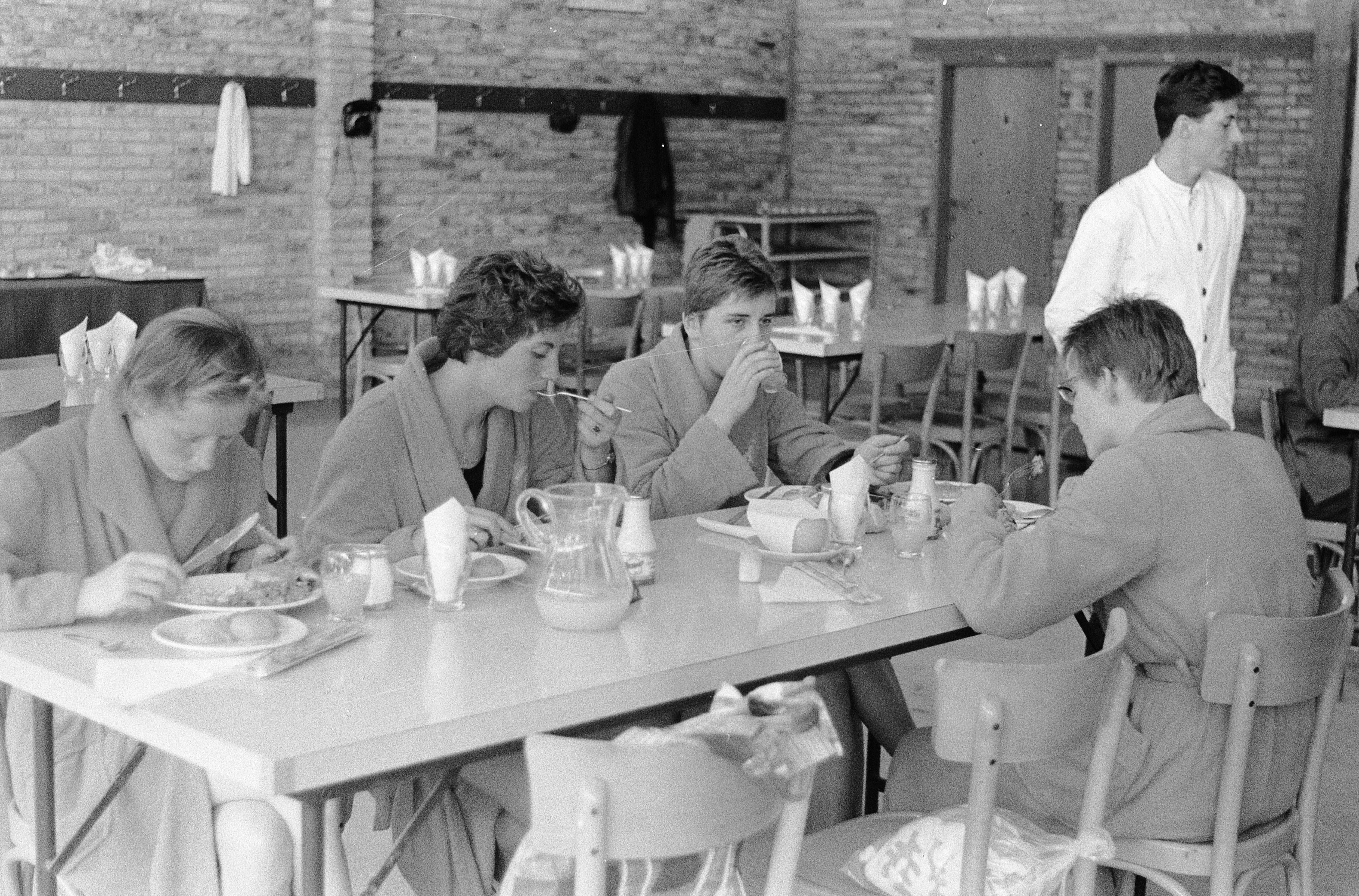 Olympische Spelen te Rome, zwemmers v.l.n.r. Corrie Schimmel, Ria van Velzen, Erica Terpstra en Cocky Gastelaars. Location: Italië, Rome